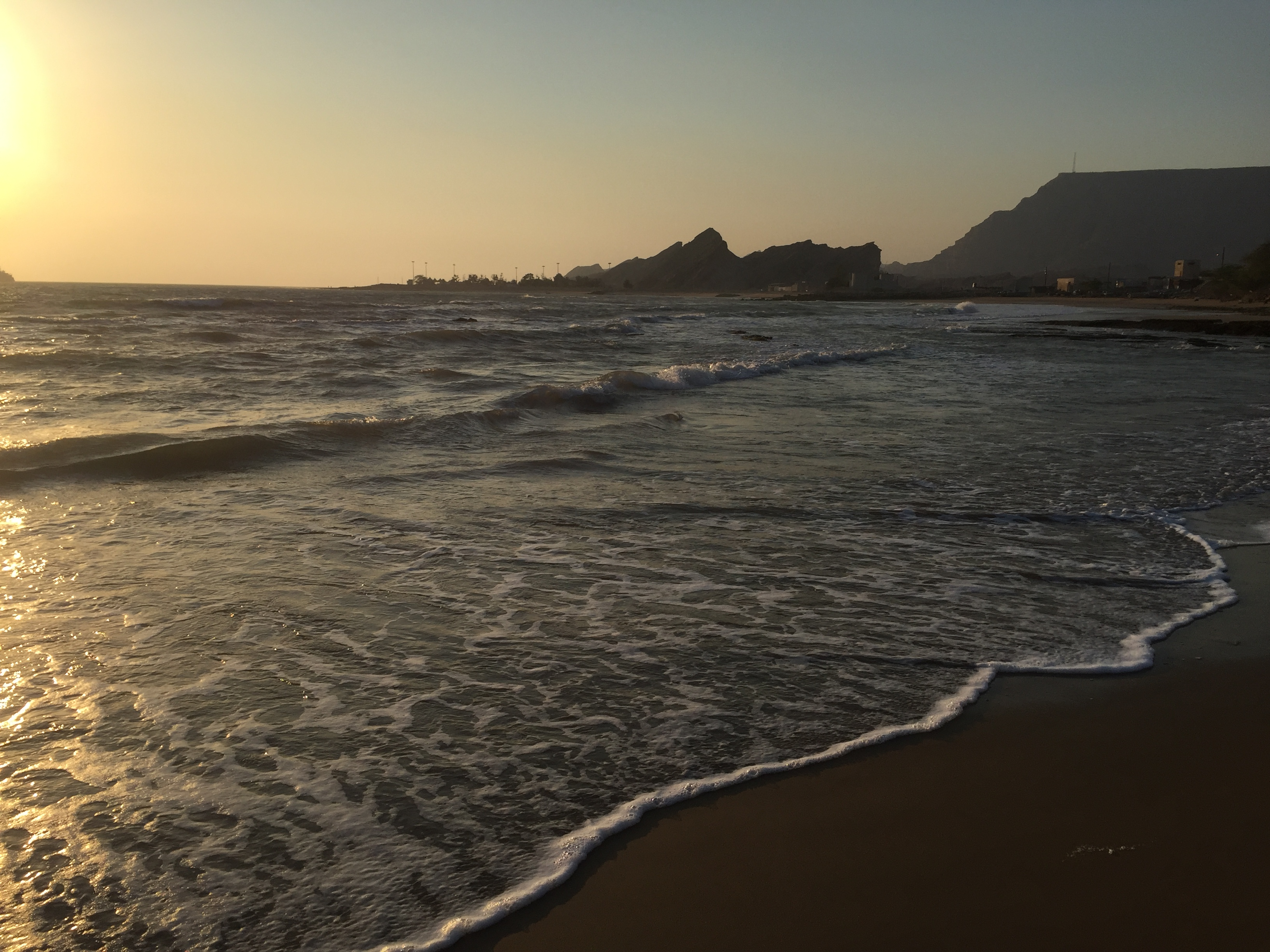 این تصویر در زمستان سال 1396 توسط محمد درویشان ثبت شده است .